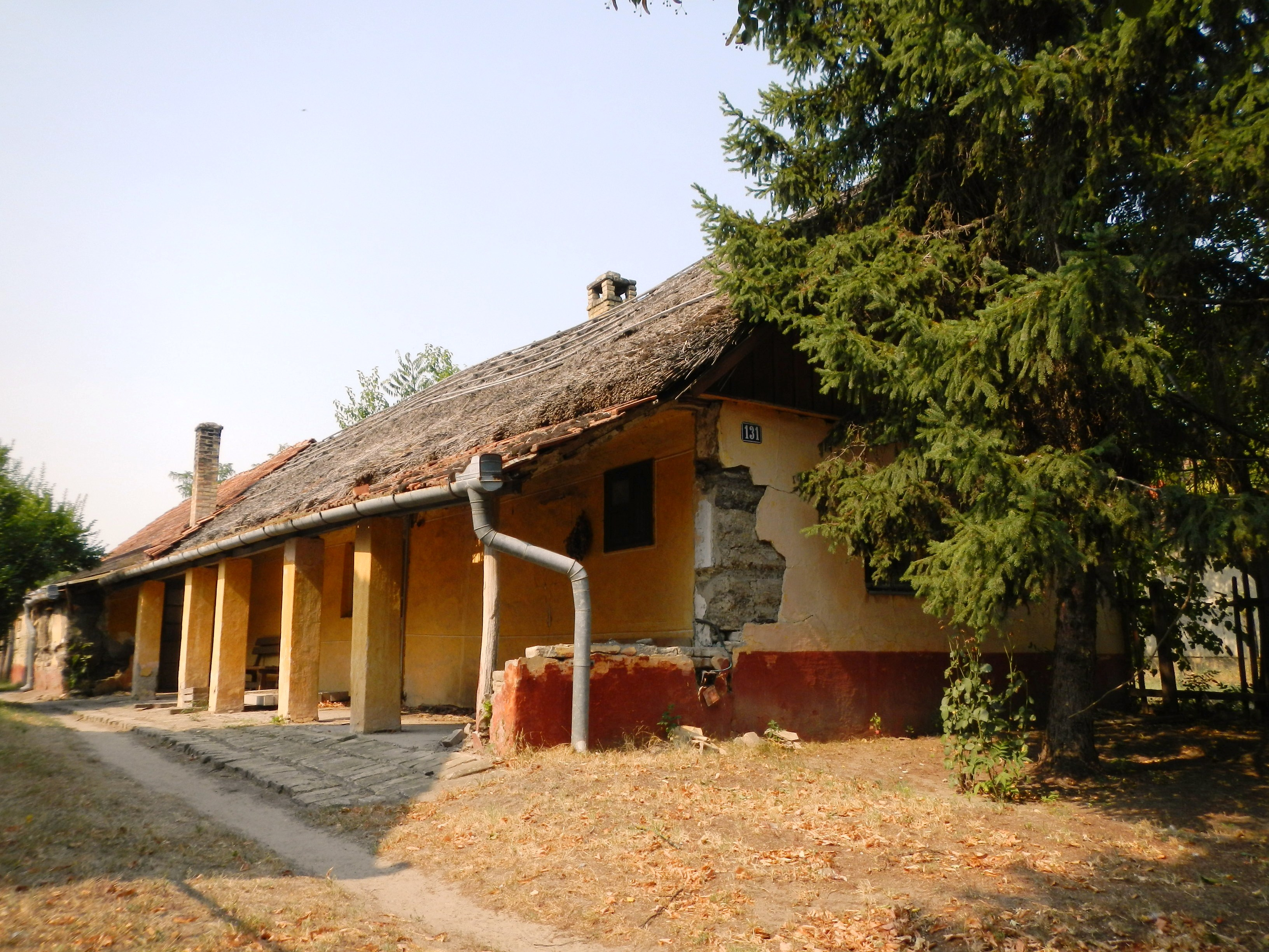 На старим мапама Келебије с краја 18. века забележени су бројни салаши келебијске пустаре у улици тада званој Керњаски пут. Једна од многобројних кућа ове фамилије налази се на списку културних добара - кућа у данашњој улици Кизура Иштвана на броју 131. Изграђена је у 19. веку у стилу народне архитектуре, панонска кућа.